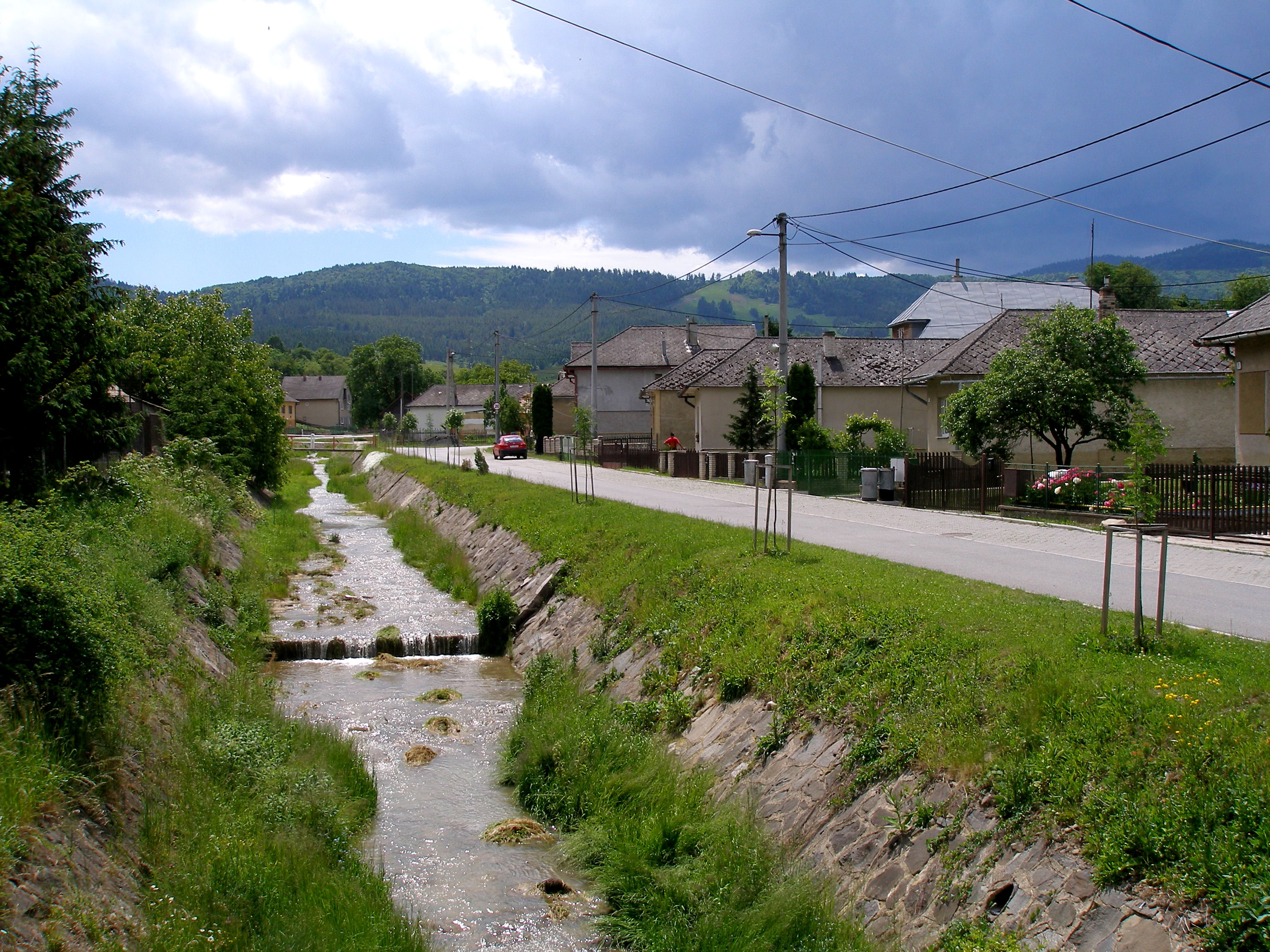 Obec Dubovica okres Sabinov